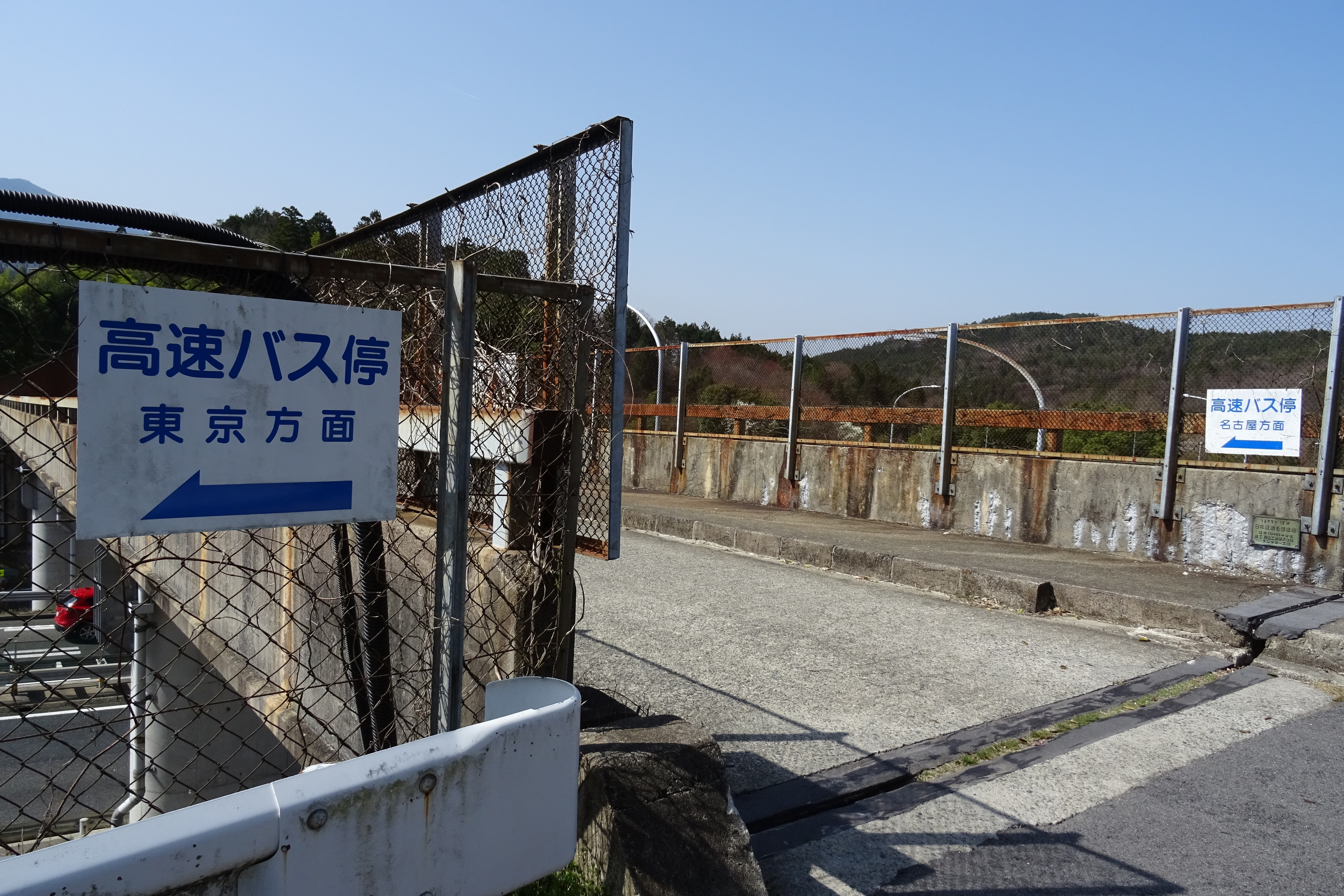 馬籠